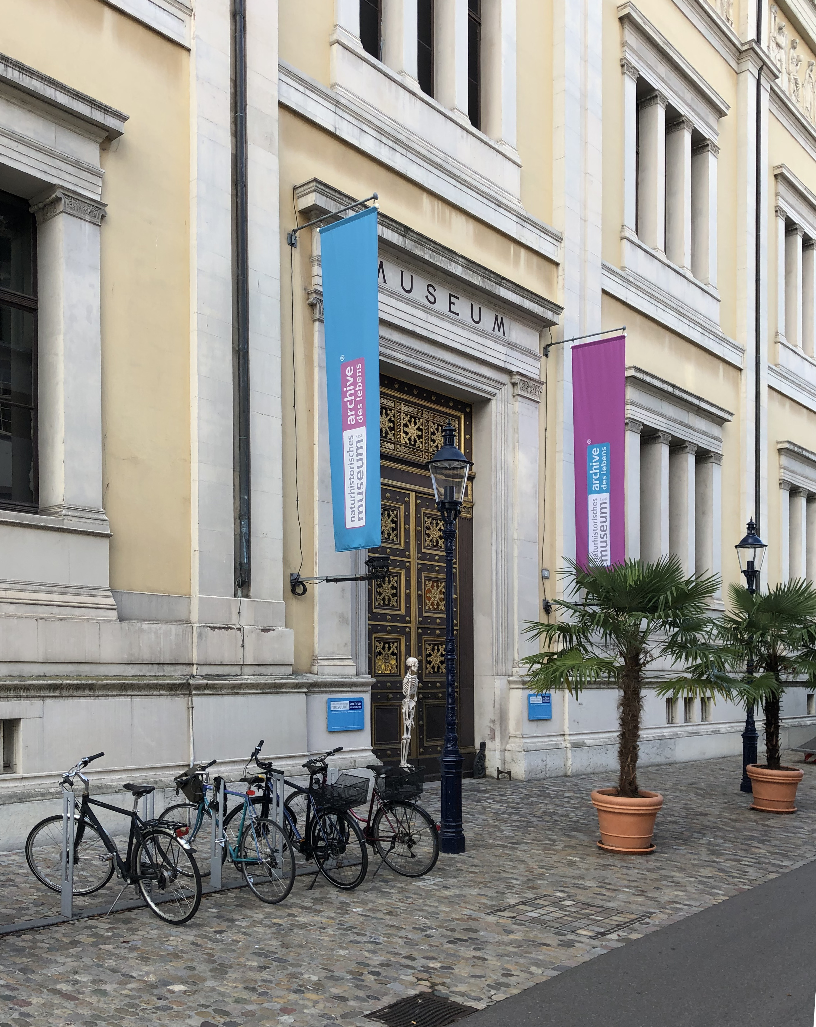 Naturhistorisches Museum Basel, Eingang